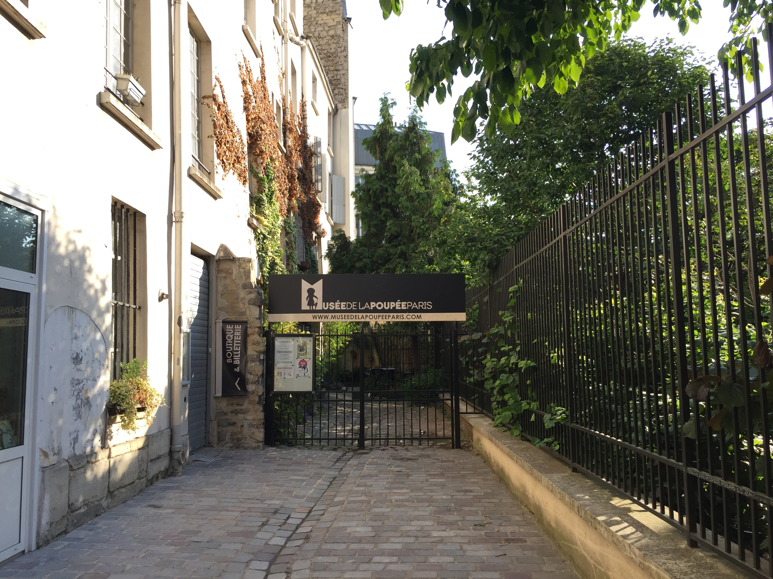 Musée de la Poupée (Paris).